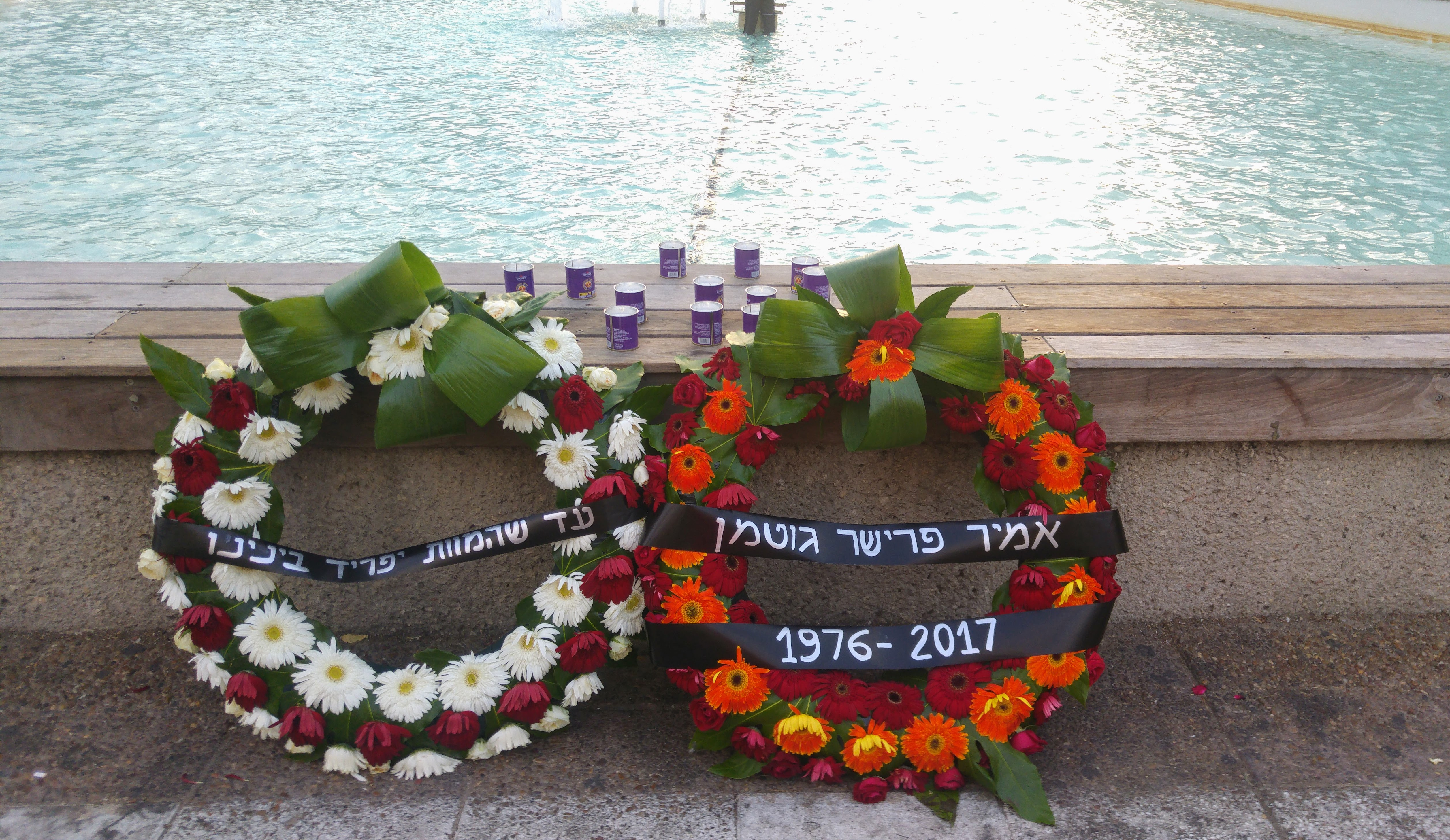 זרים בכיכר רבין בתל אביב ביום הלוויתו של אמיר פרישר גוטמן